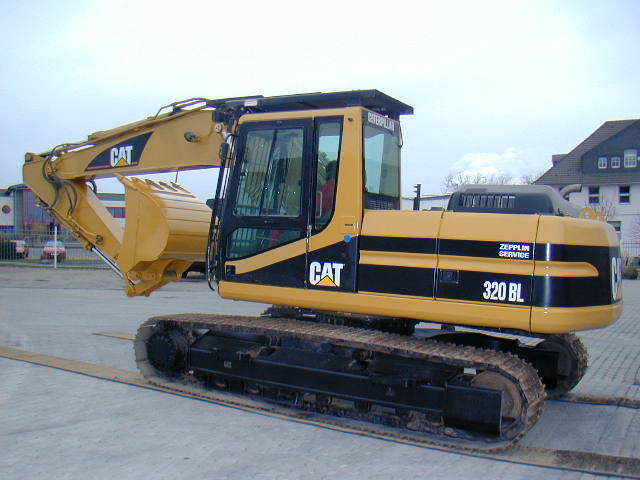 Caterpillar 320 BL, Baujahre 1997-2002, Gewicht 21-24 t, Leistung 96-101 kW